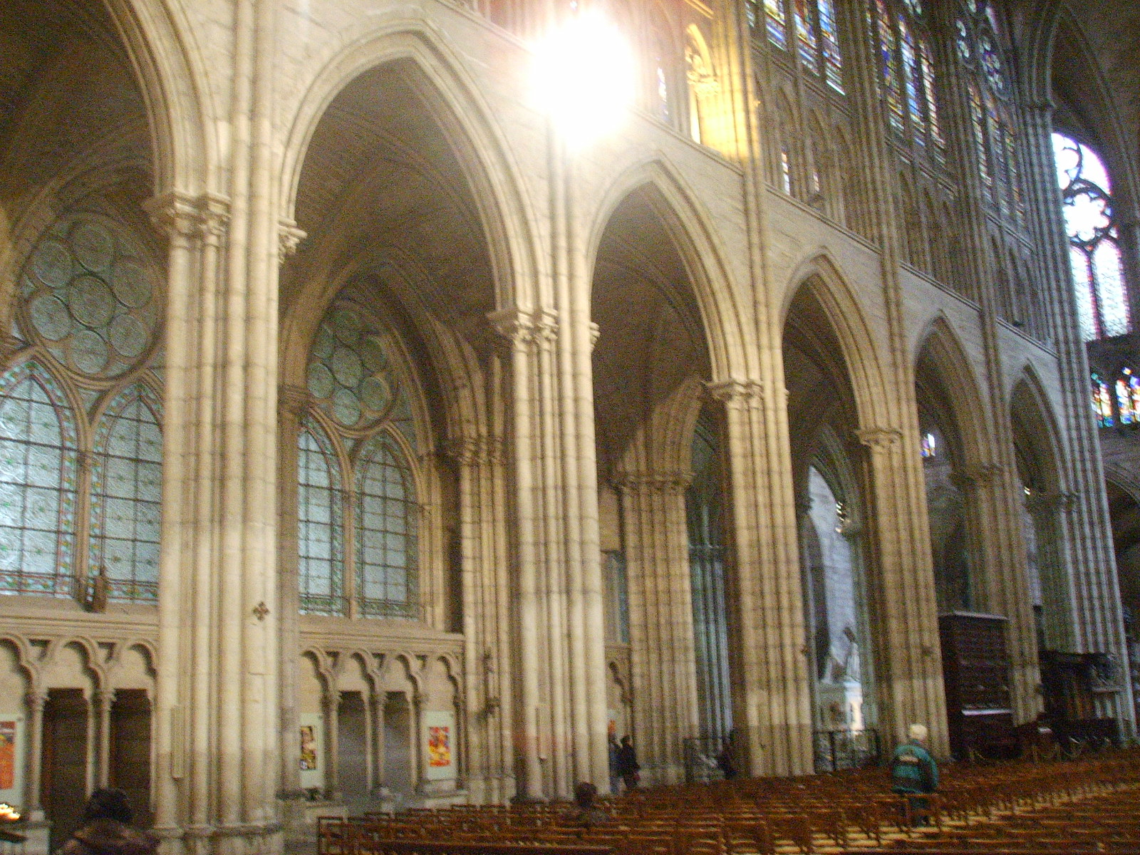 Basilica_di_saint_Denis inside Paris